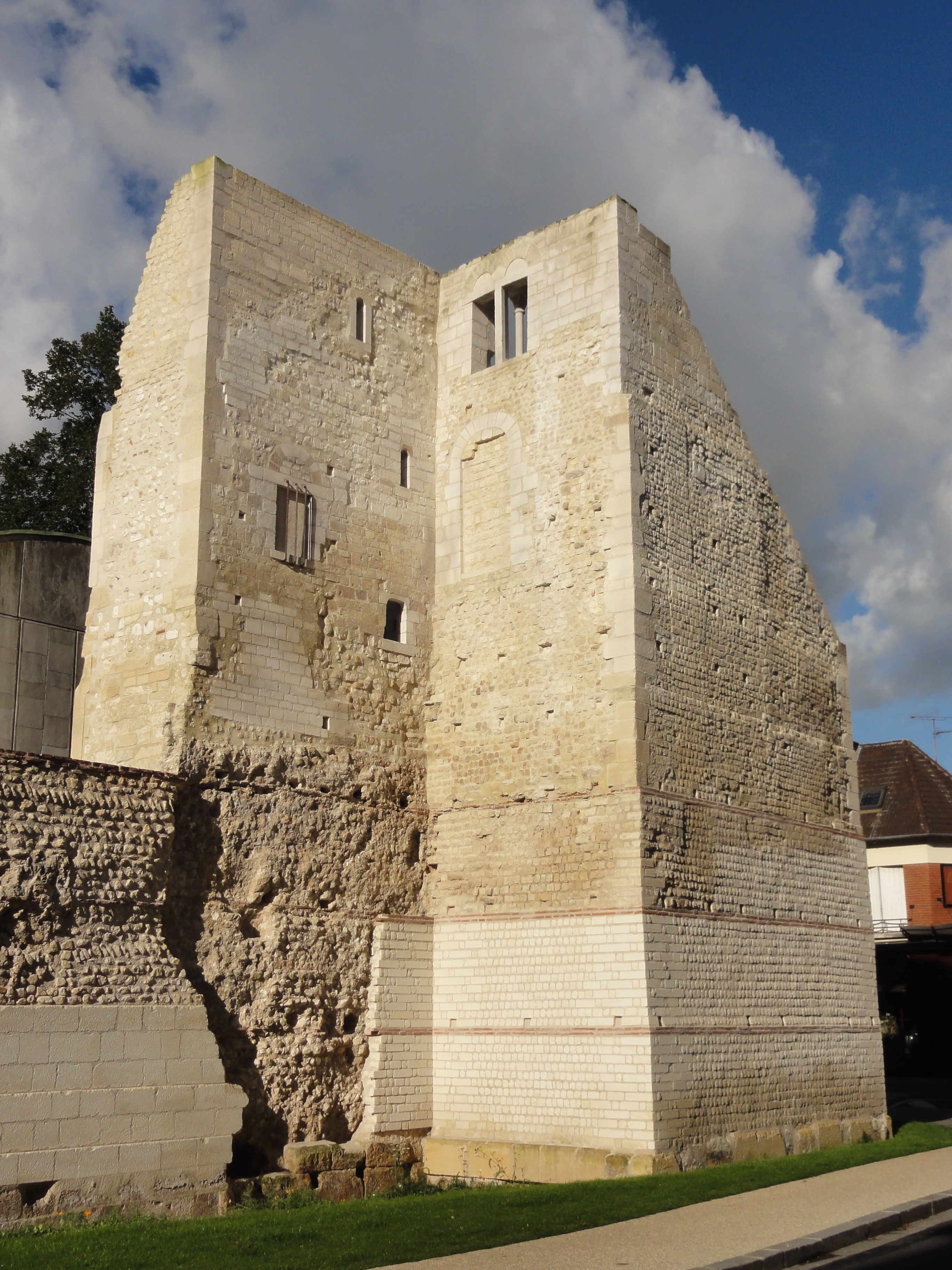 Remparts gallo-romains, rue Philippe de Dreux.